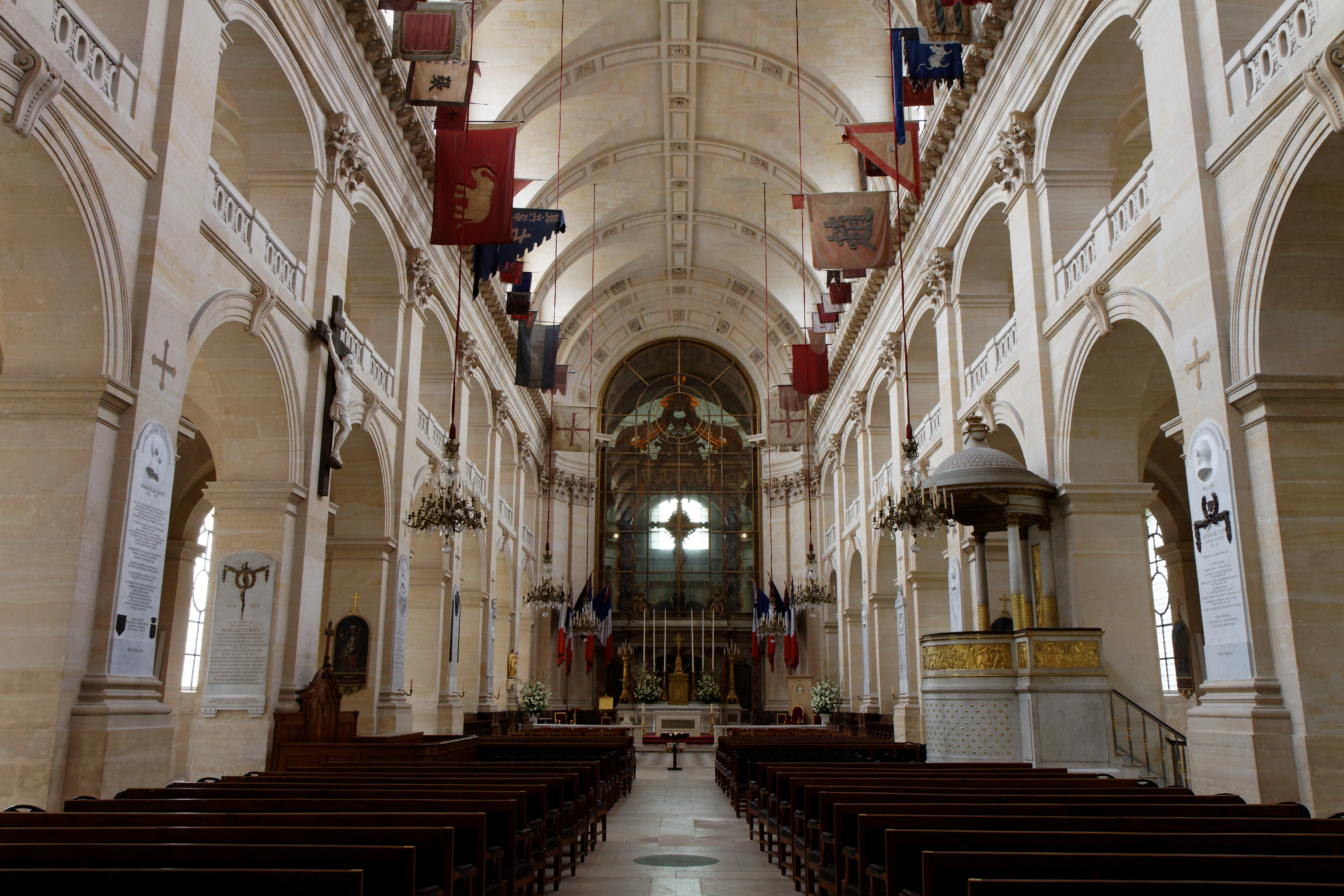 Vue de l'intérieur de la cathédrale Saint Louis des Invalides à Paris. .